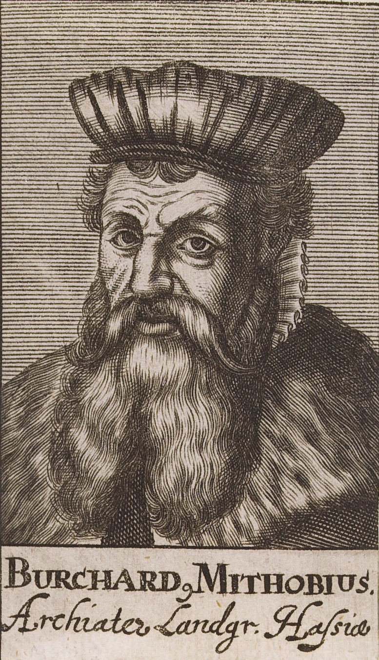 Bildnis von Burckard[us] Mithobius